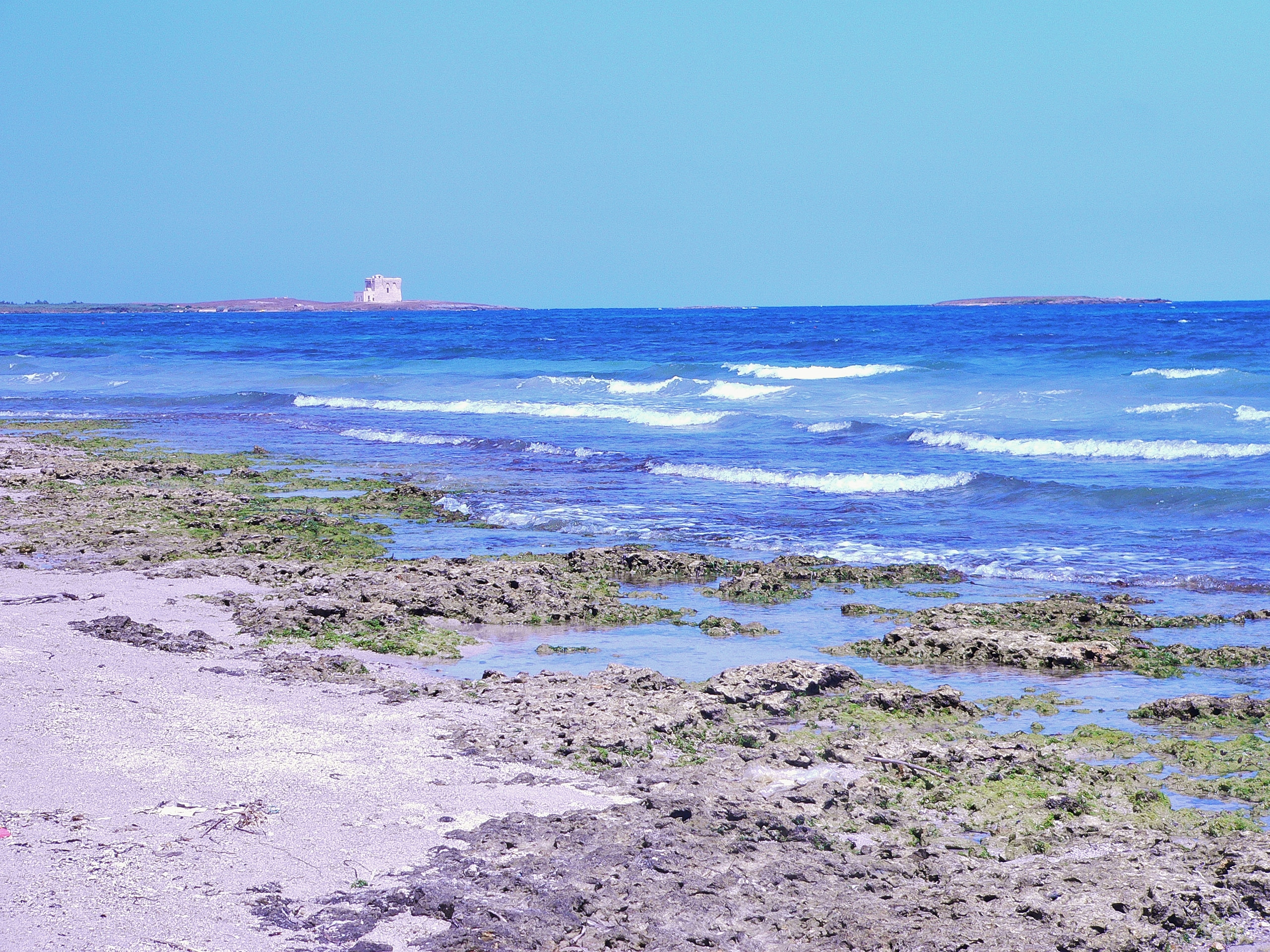 Foto scattata nella parte est della riserva, la torre e una delle piccole isole This is a photo of a monument which is part of cultural heritage of Italy. The authorisation for taking photos of this object was provided by the World Wide Fund for Nature Italy.